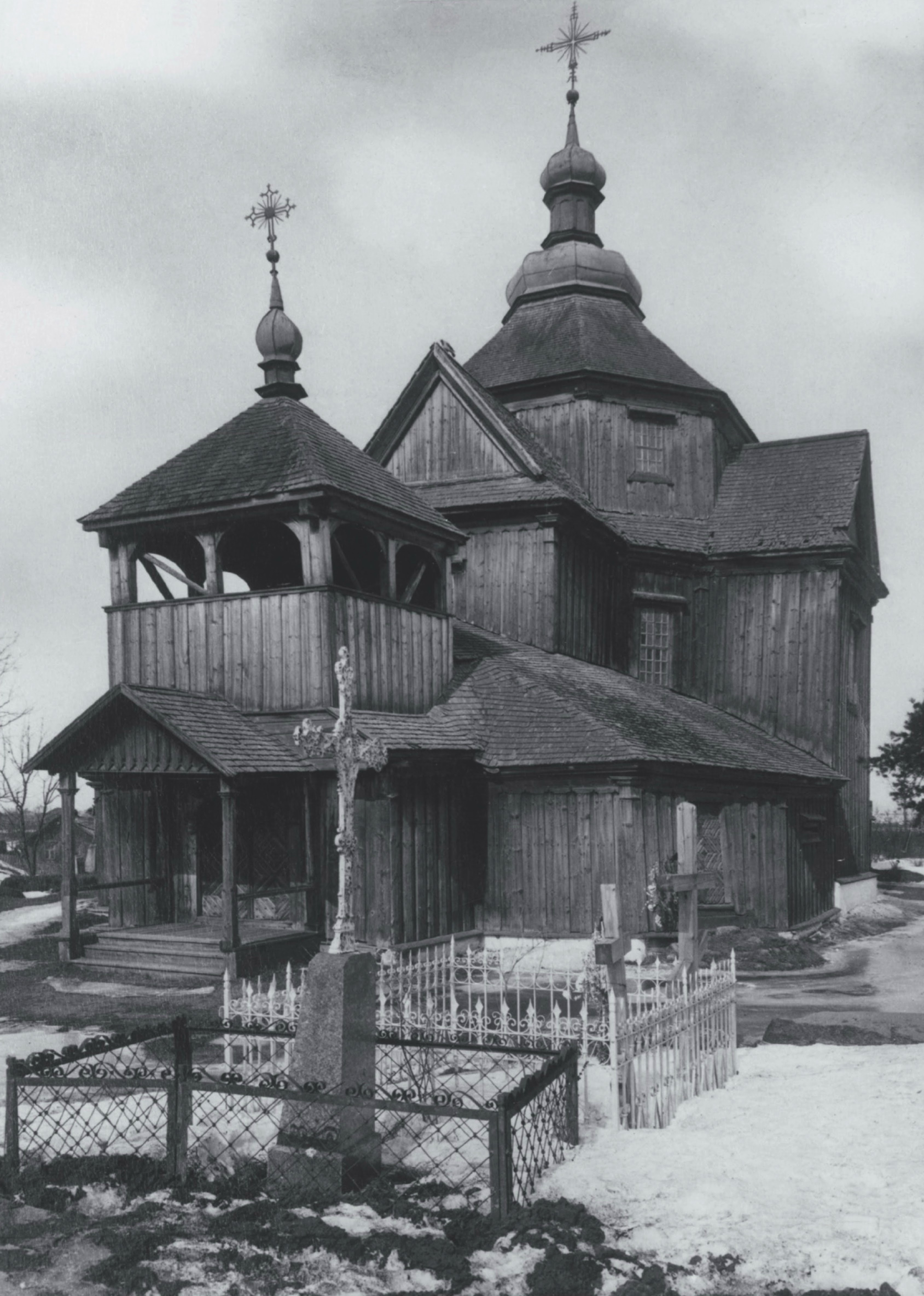 Беларуская (тарашкевіца): Віцебск (Viciebsk), Пескавацік (Pieskavacik). Царква Сьвятой Тройцы (Чорная)